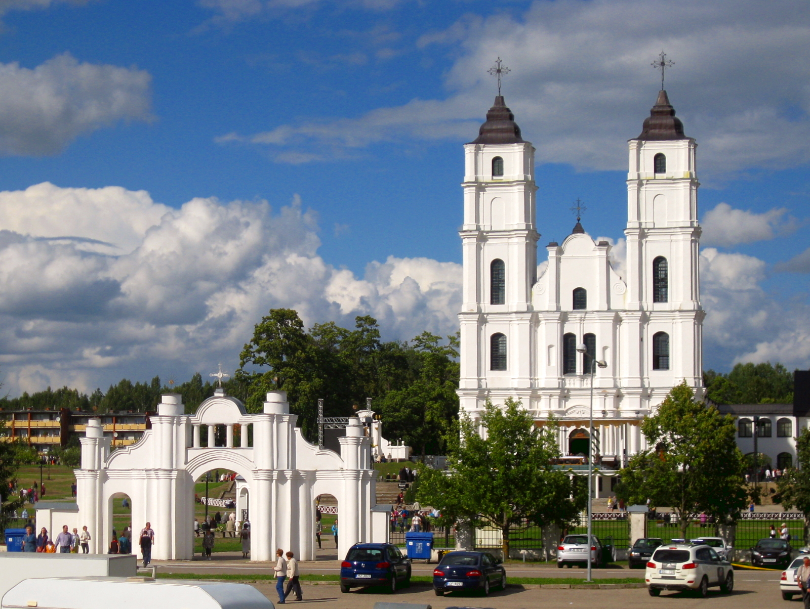 Aglonas bazilika